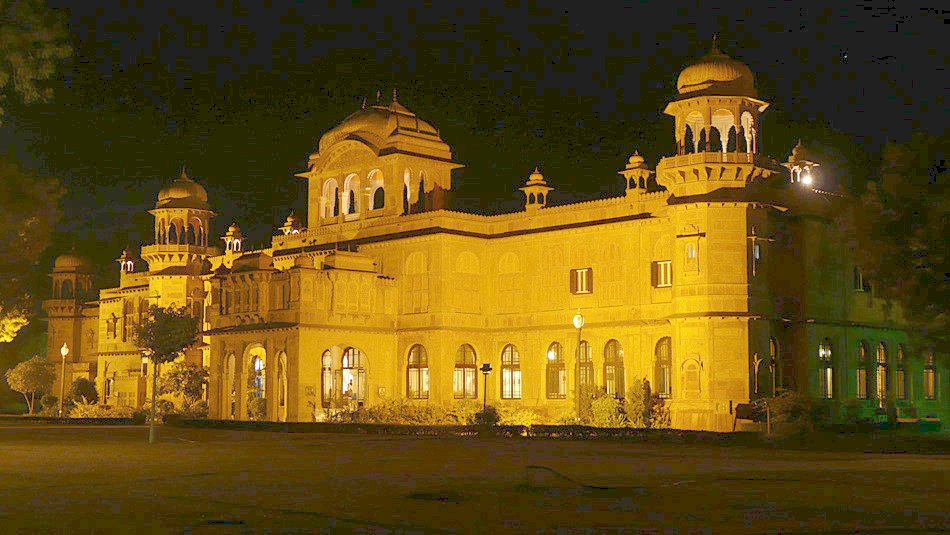 Lalgarh Palace in Bikaner, Rajasthan, India